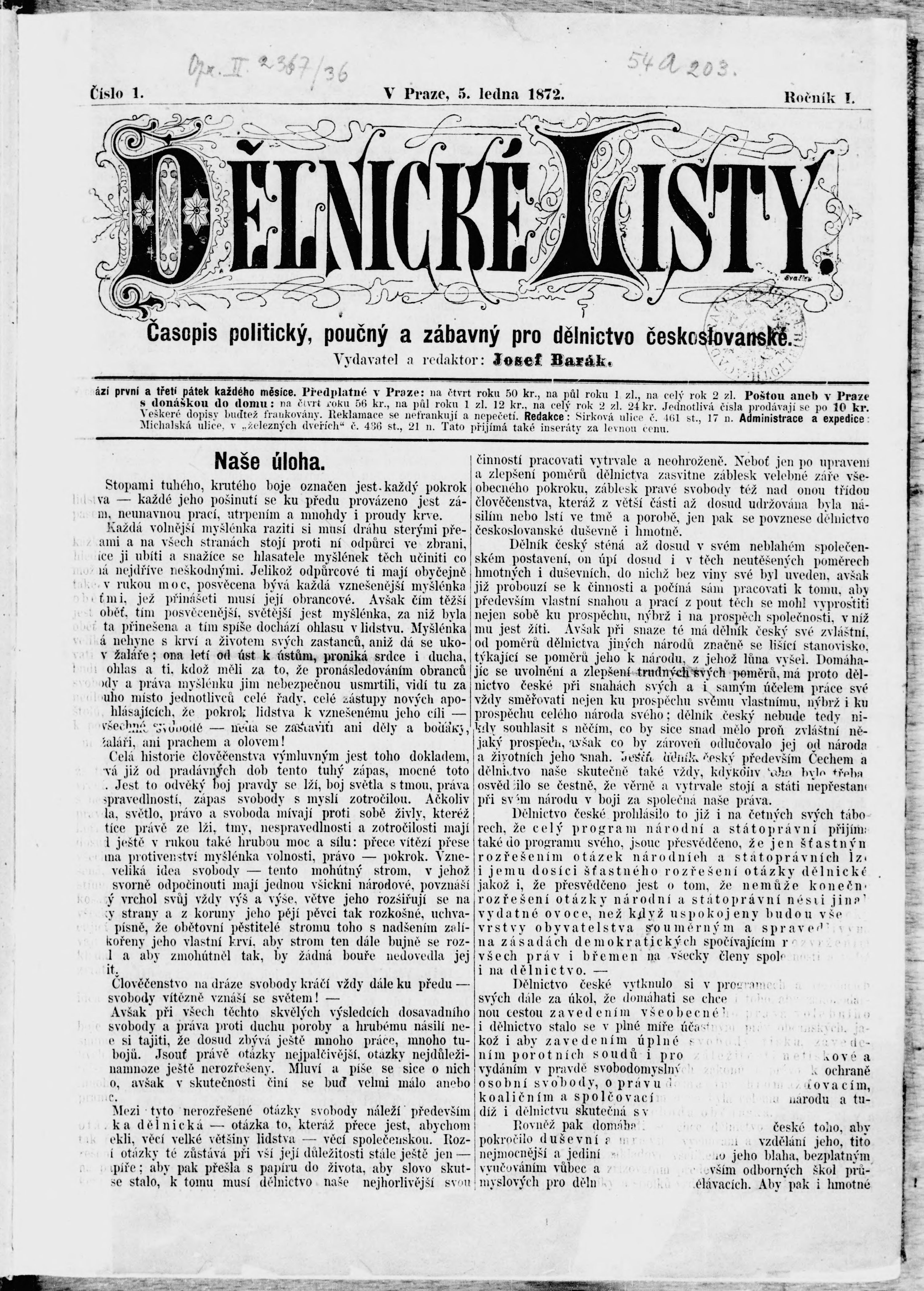 Dělnické listy, die erste Ausgabe von 5. Januar 1872 (noch redigiert durch J. Barák)